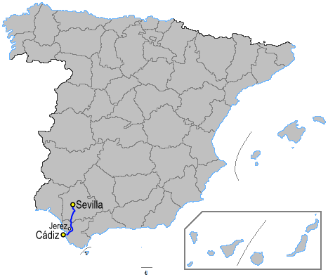 Mapa de la autopista AP4